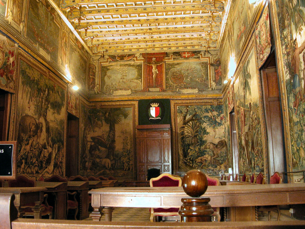 La Valletta, Malta, l'interno del Palazzo del Grande Maestro. Foto scattata da Stefano Trezzi e rilasciata sotto Creative Commons.